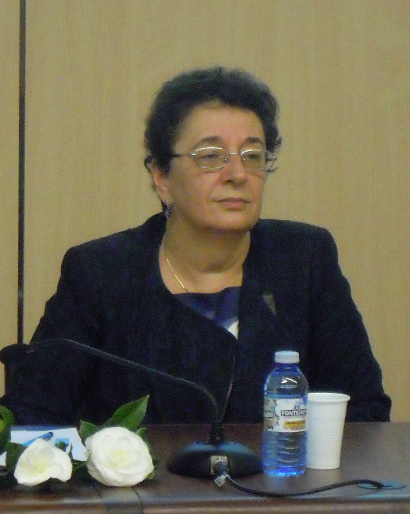 Rosario Álvarez Blanco no III Coloquio de Lingüística Histórica na Facultade de Filoloxía de Vigo